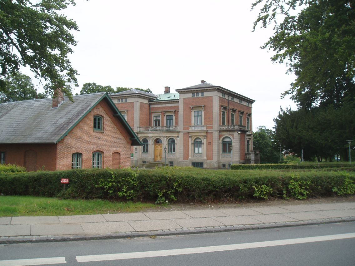 Den tidligere amtmandsbolig, nu politistation, i Svendborg.